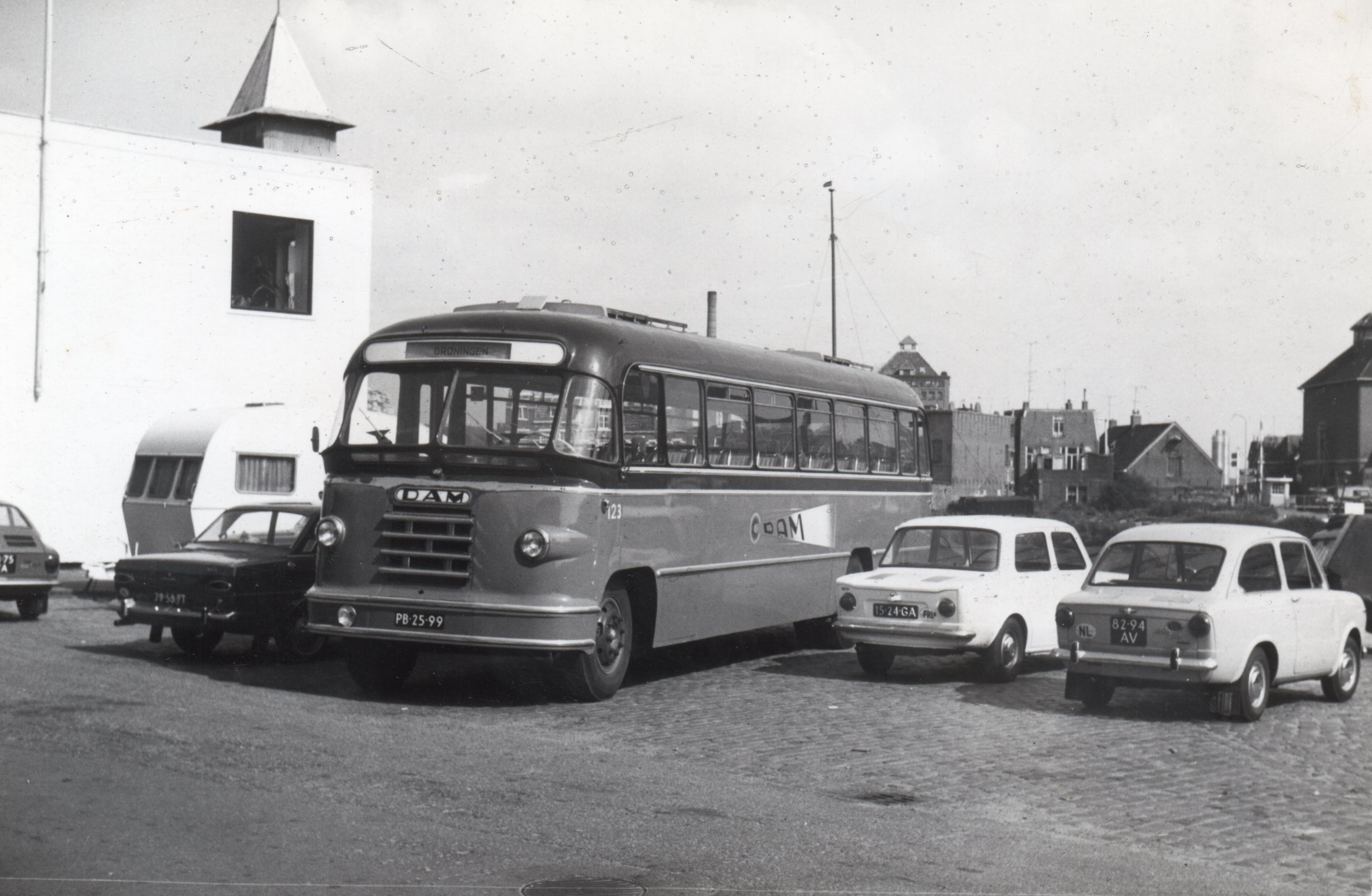 DAM-bus 123 DAF/Smit Ap. (1954) Oosterkade Groningen, zomer 1969